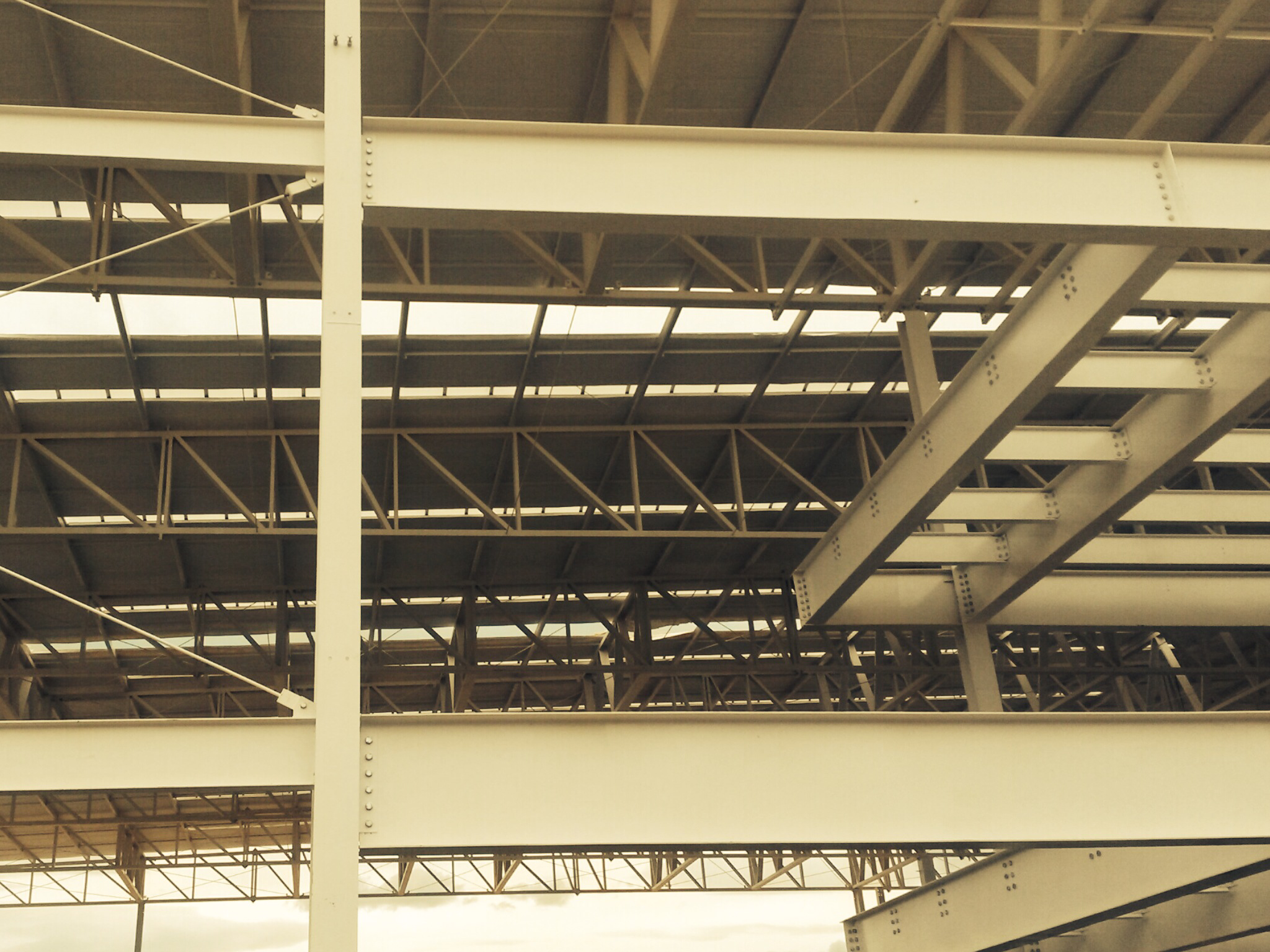 Detalhes da Estrutura Metálica do Projeto 32 - Maio 2014.